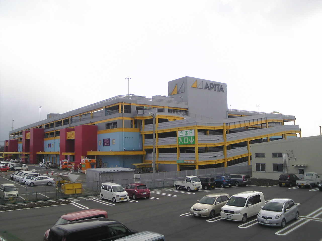 アピタ大口店店舗外観